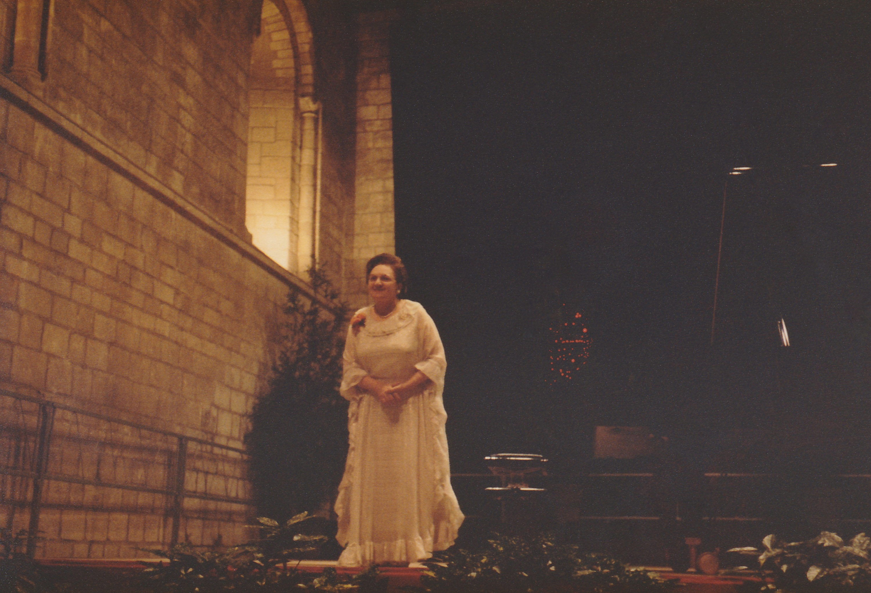 Yvonne Loriod interprétant les Vingt Regards sur l'Enfant-Jésus à Caen en 1983